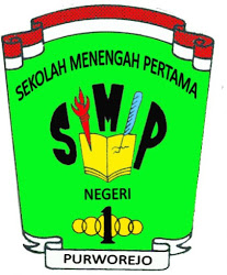 Logo SMP Negeri 1 Purworejo